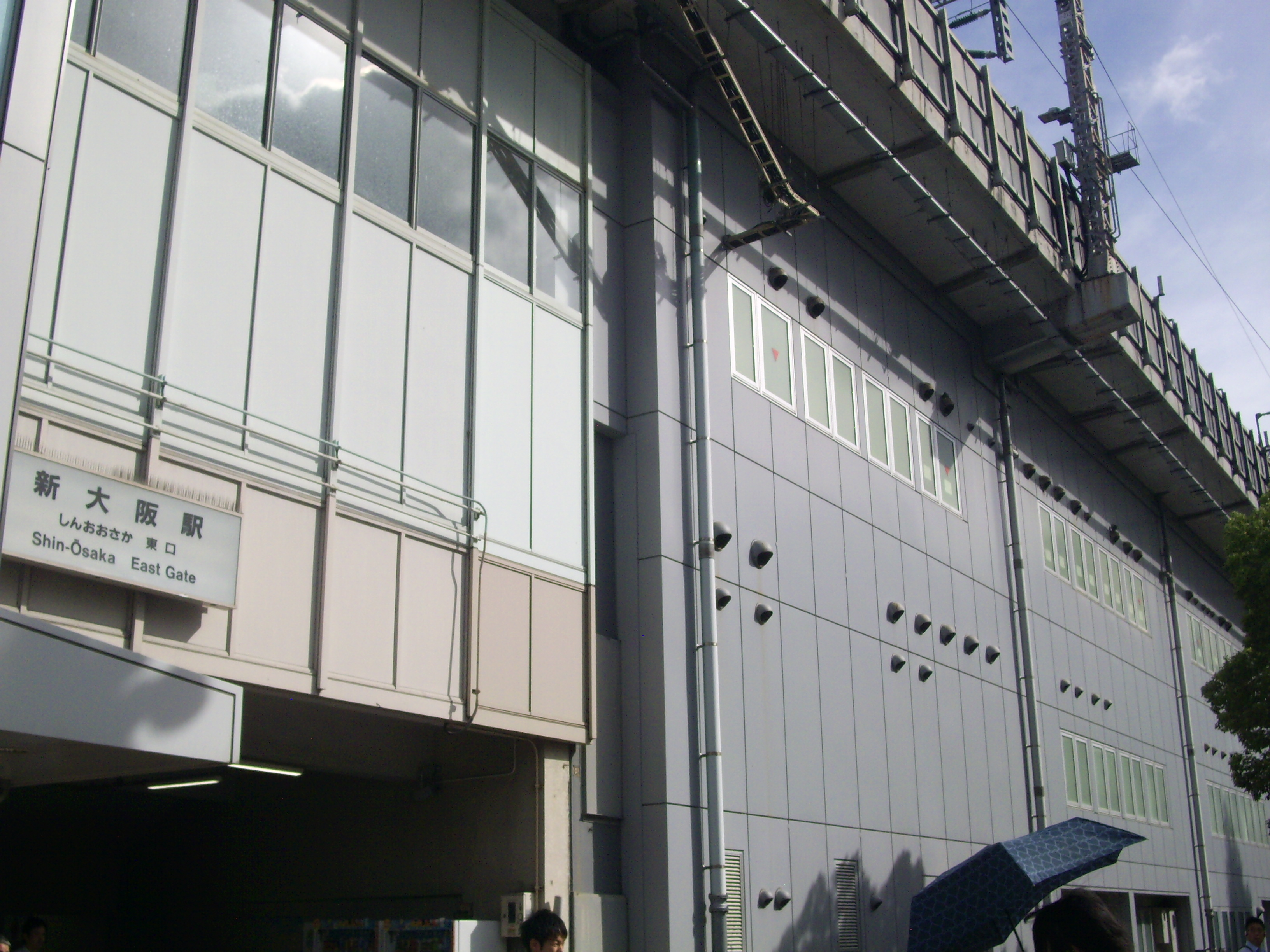 東海道新幹線大阪第一・第二運輸所および大阪保線所・大阪新幹線構造物検査センター・大阪電力所・大阪信号通信所・JR東海関西労組等が入居する新大阪駅東京方高架下 ㊟カメラを起動すると日付機能が出荷時のものに初期化されるため、ファイル履歴の投稿日時とメタデータの原画像データの生成日時が異なります（本概要欄の下記日付が撮影日）